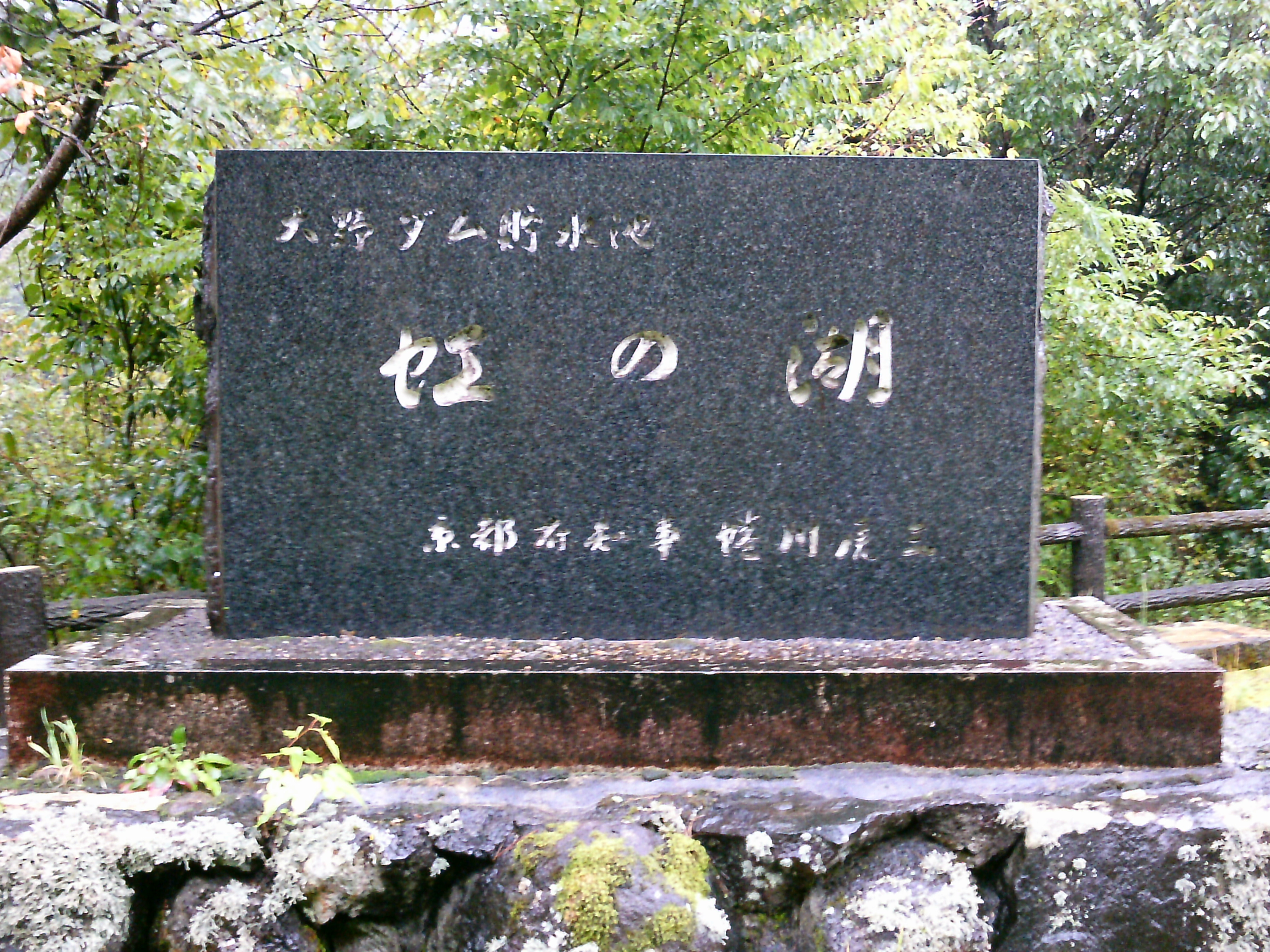 由良川の大野ダム、虹の湖としての石碑